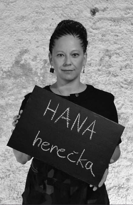 Portrét herečky Hany Mathauserové.